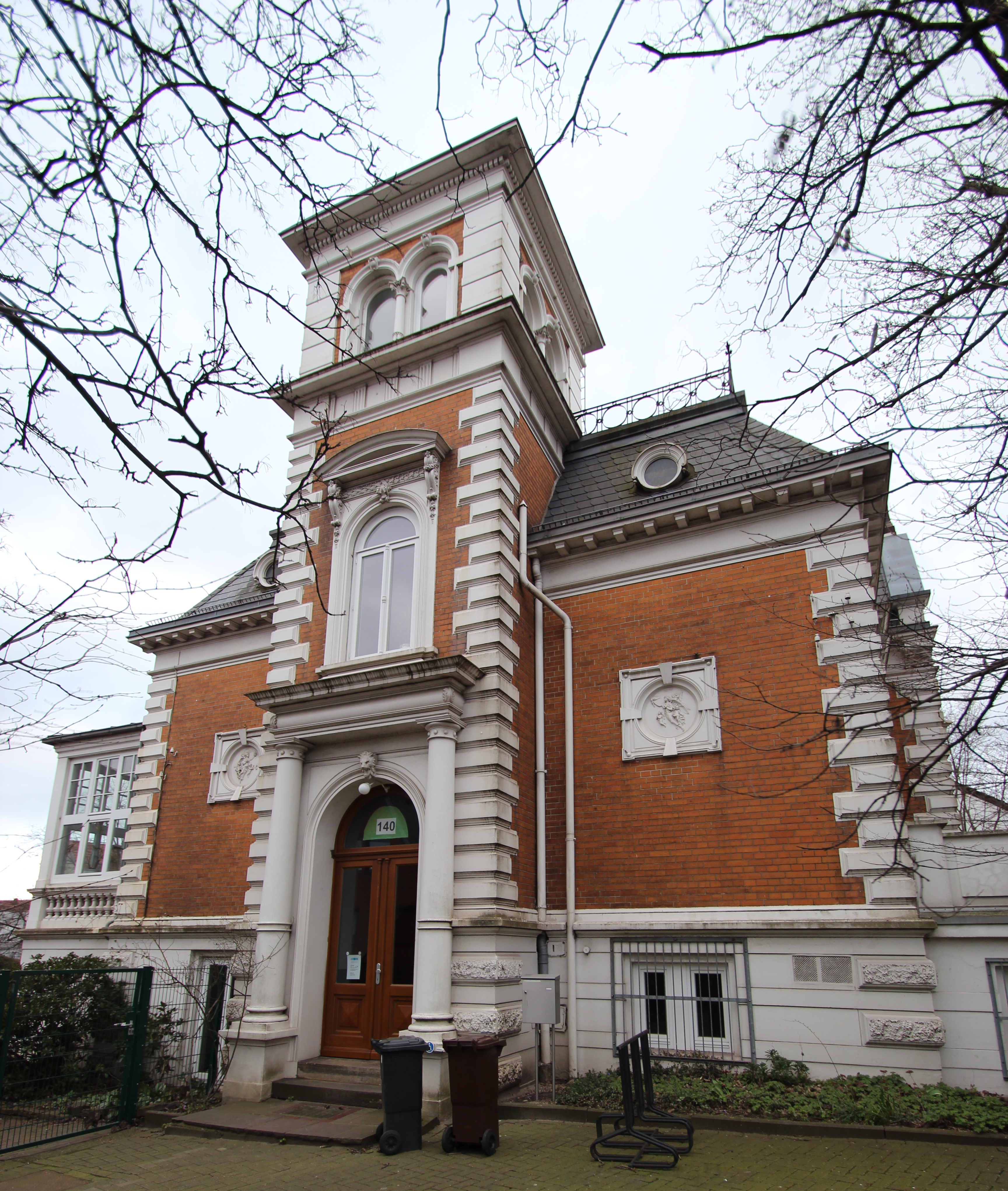 Villa Oesselmann in Bremen, Waltjenstraße 140. Das abgebildete Objekt ist ein geschütztes Kulturdenkmal in der Freien Hansestadt Bremen, mit der Nr. 1238 beim Landesamt für Denkmalpflege registriert.